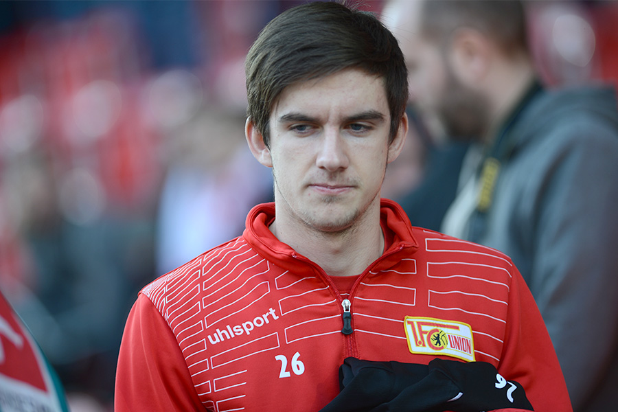 Valmir Sulejmani